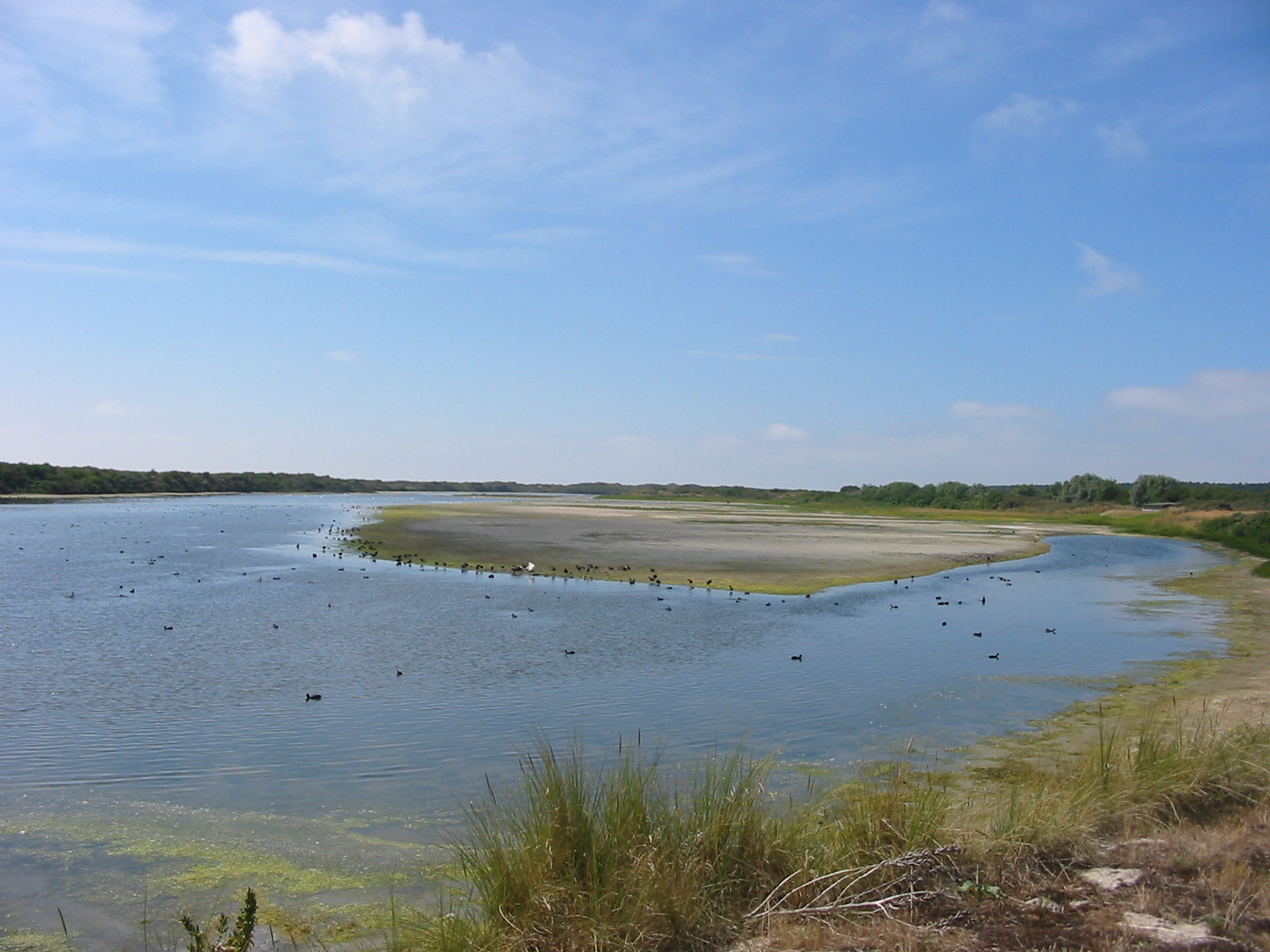 Parc ornithologique du Marquenterre, France